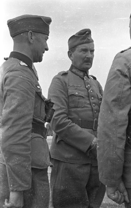 r. Generaloberst Ritter von Schobert l. Oberstltn. v. Ahlfen Am Pruth, 1.7.41